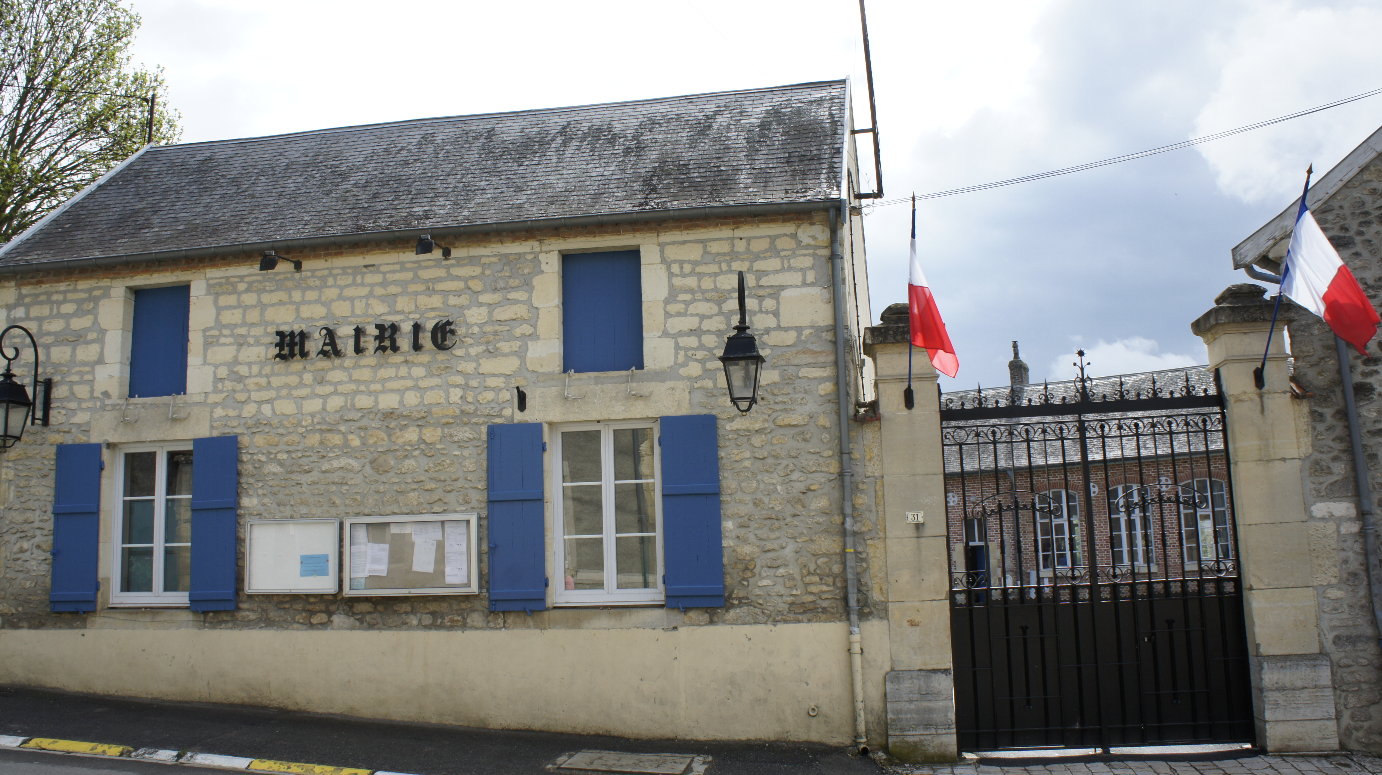 Vue de la mairie de Montigny .